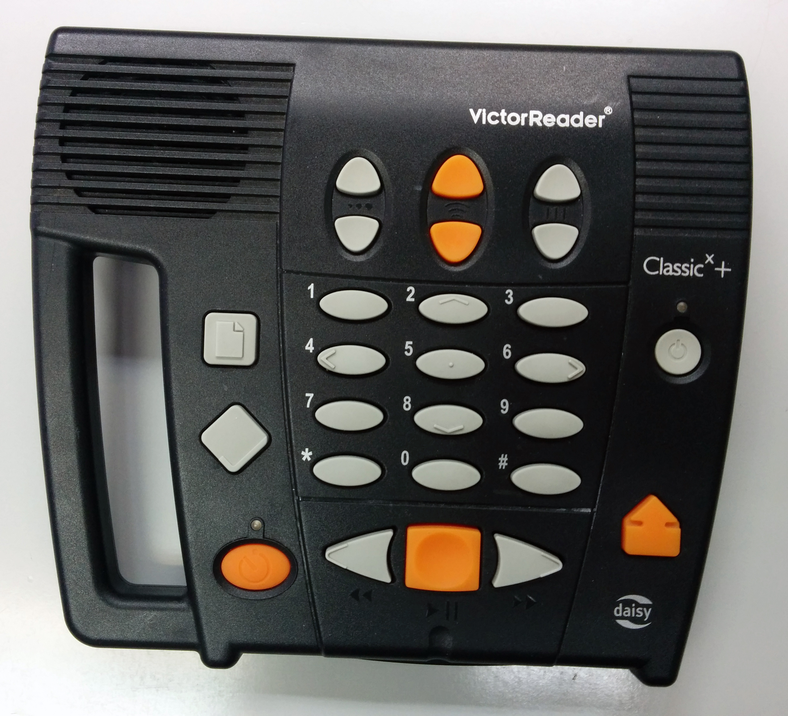 Victor Reader - Daisy